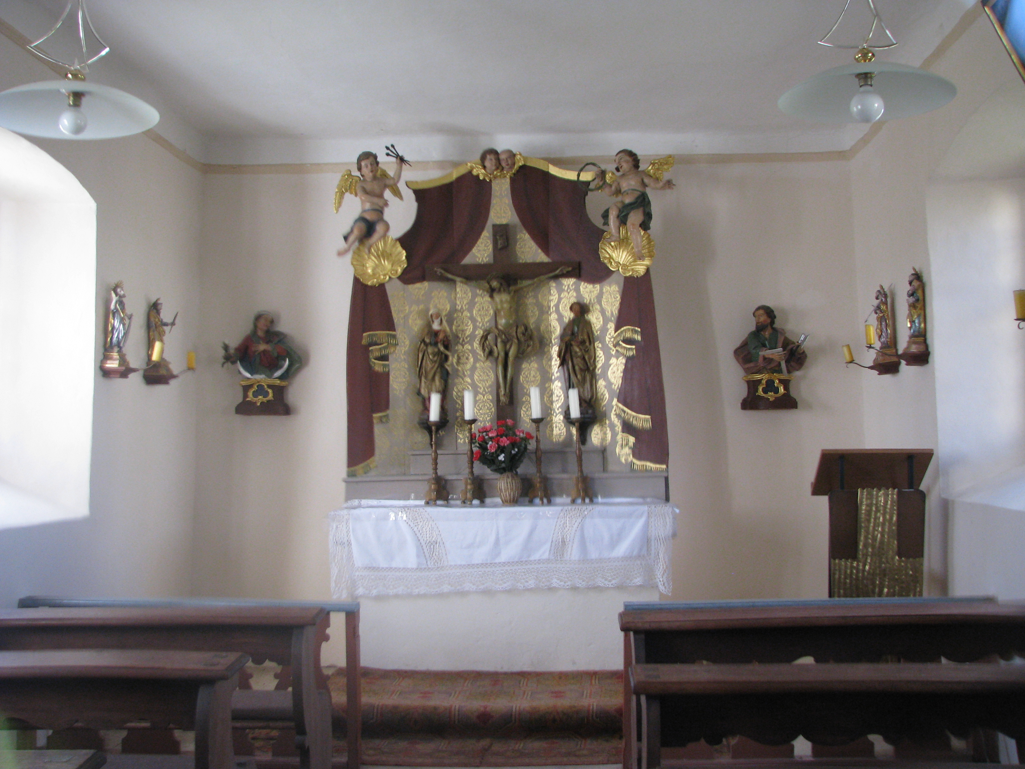 Bischofsholz, Ortsteil von Hilpoltstein im mittelfränkischen Landkreis Roth, Katholische Ortskapelle, Inneres